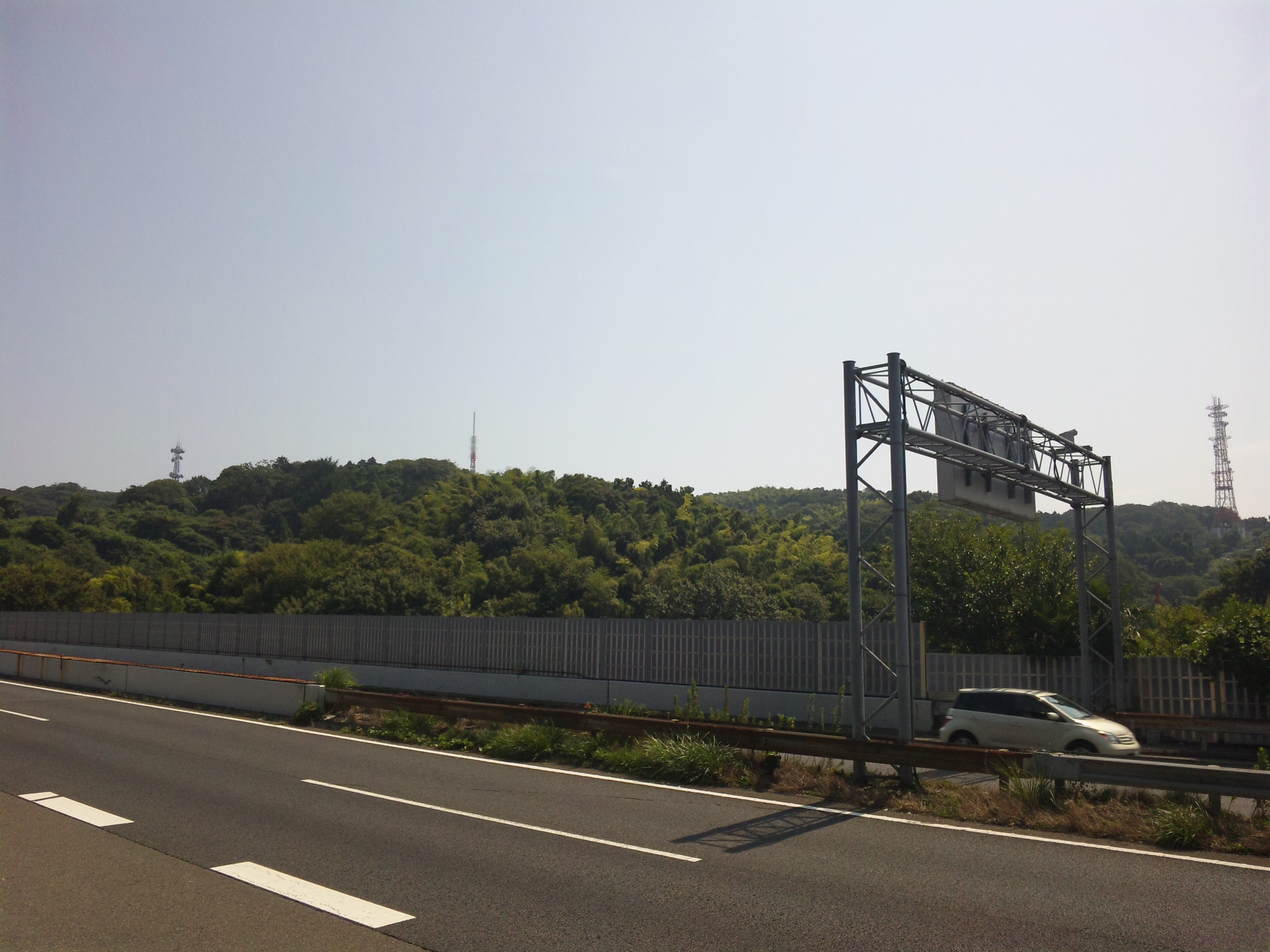 円海山 横浜市